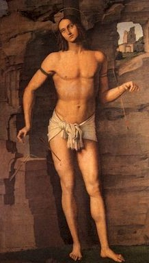 Dipinto con il Céson dietro